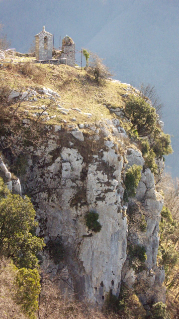 I resti dell'Eremo di San Michele sul monte Camposauro, nel territorio di Frasso Telesino (BN)